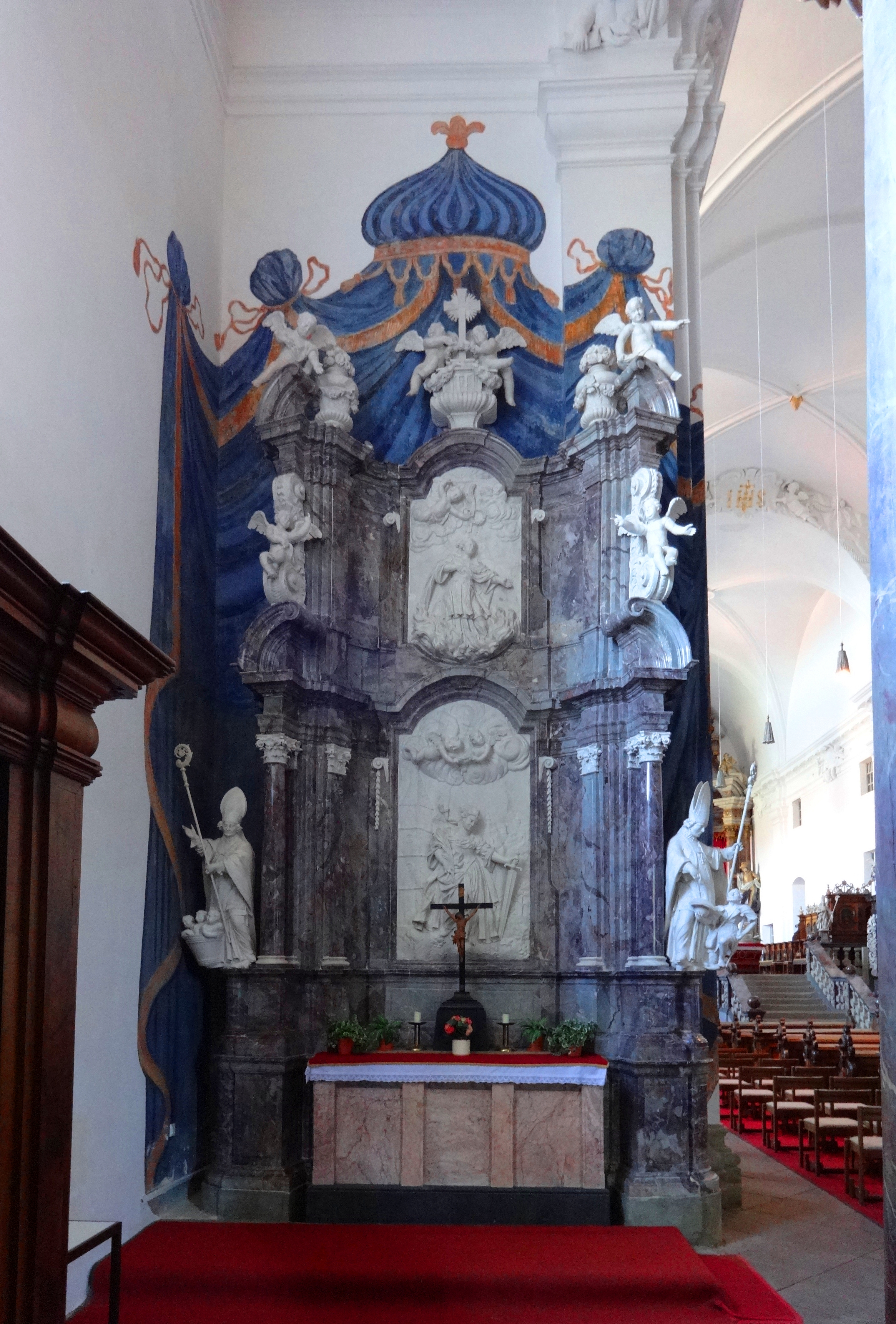 Goslar-Grauhof, St. Georg, linker Seitenaltar hinten, Barbaraaltar